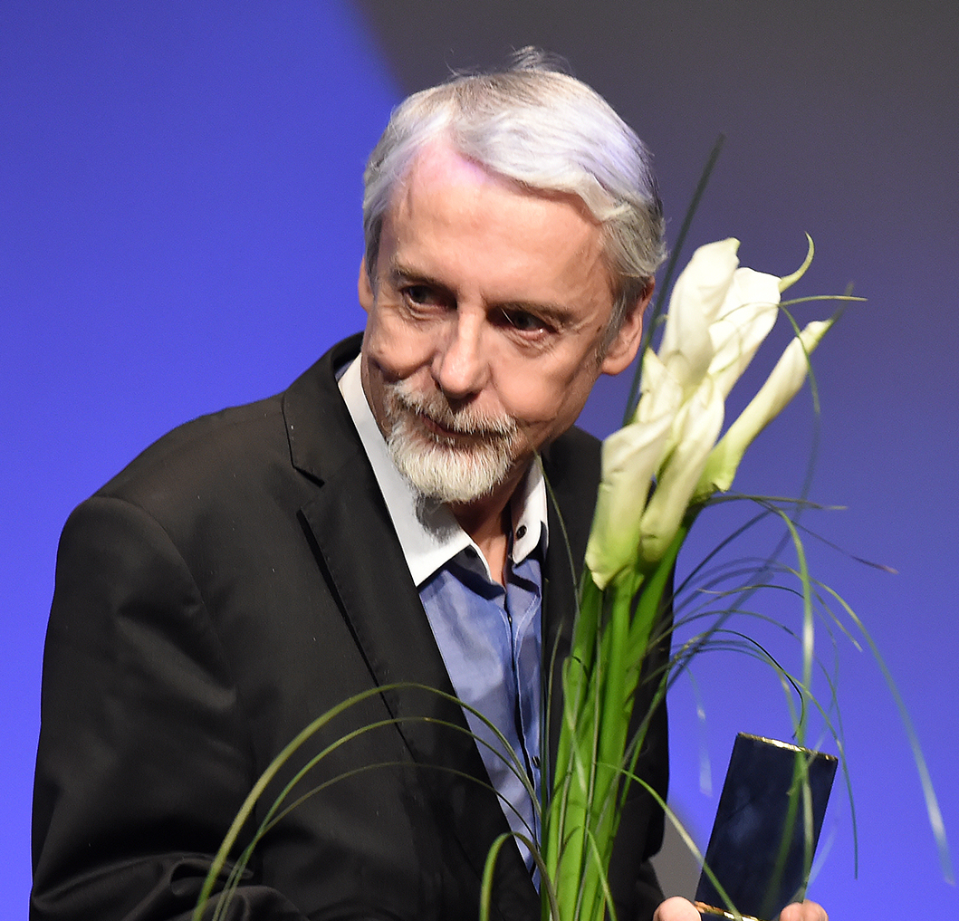 Ladislav Hohoš - filozof, december 2015